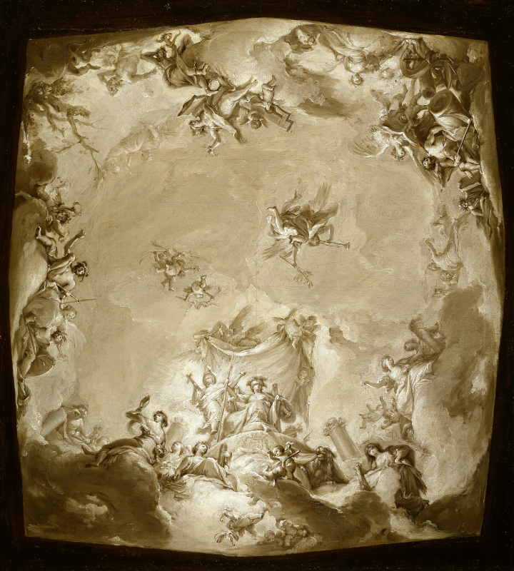 La Monarquía española, Francisco Bayeu y Subías. Óleo sobre lienzo, 63 x 59 cm, 1794. Boceto para el fresco del techo del Tocador de la Reina del Palacio Real de Madrid.